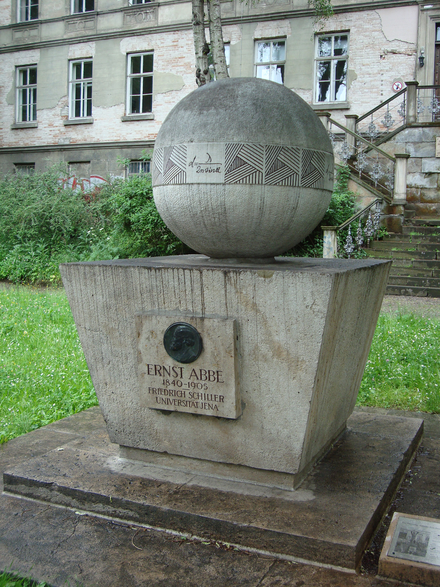 Ernst Abbe Denkmal in Jena "Am Fürstengraben 23"